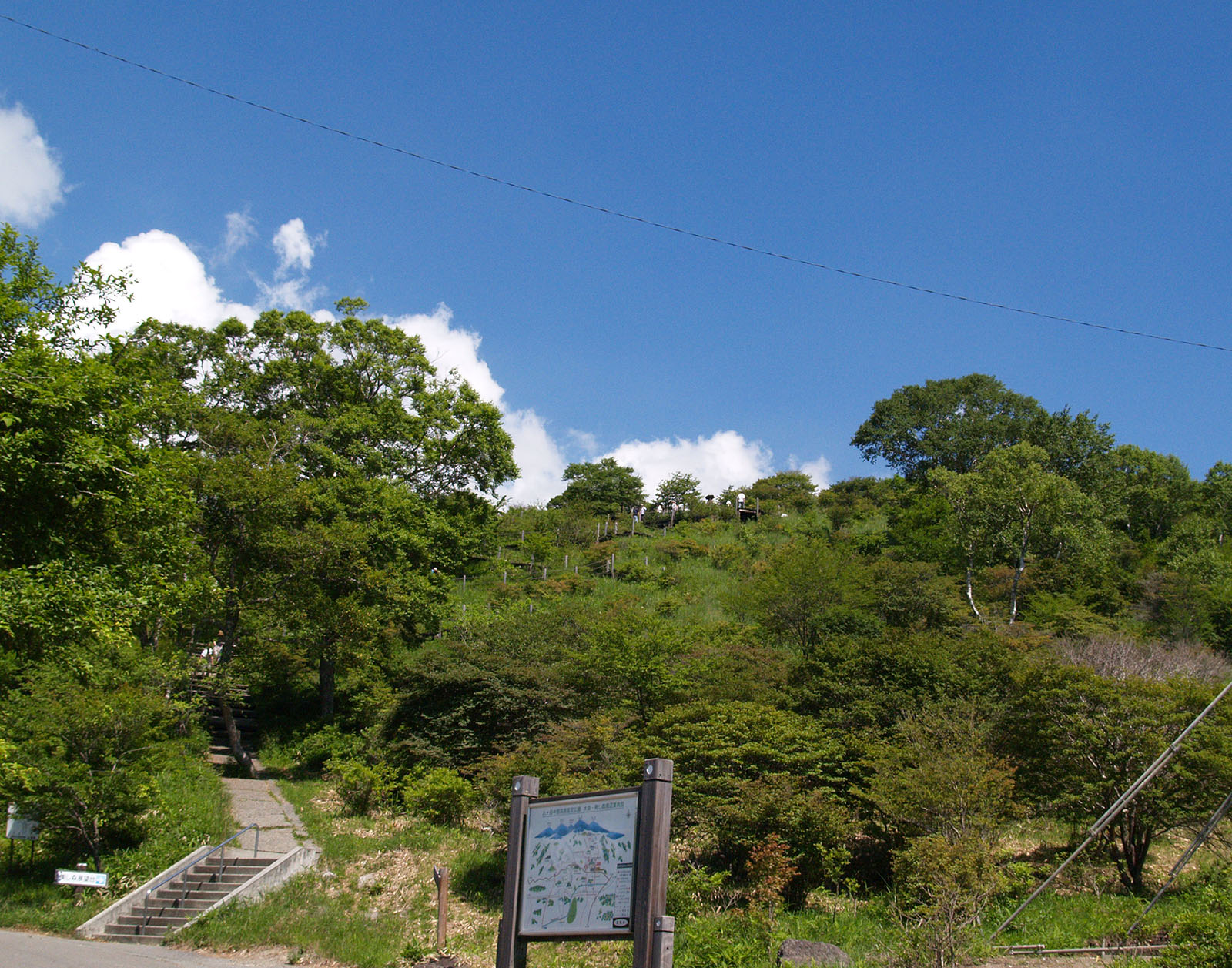 美し森（登山口付近から）